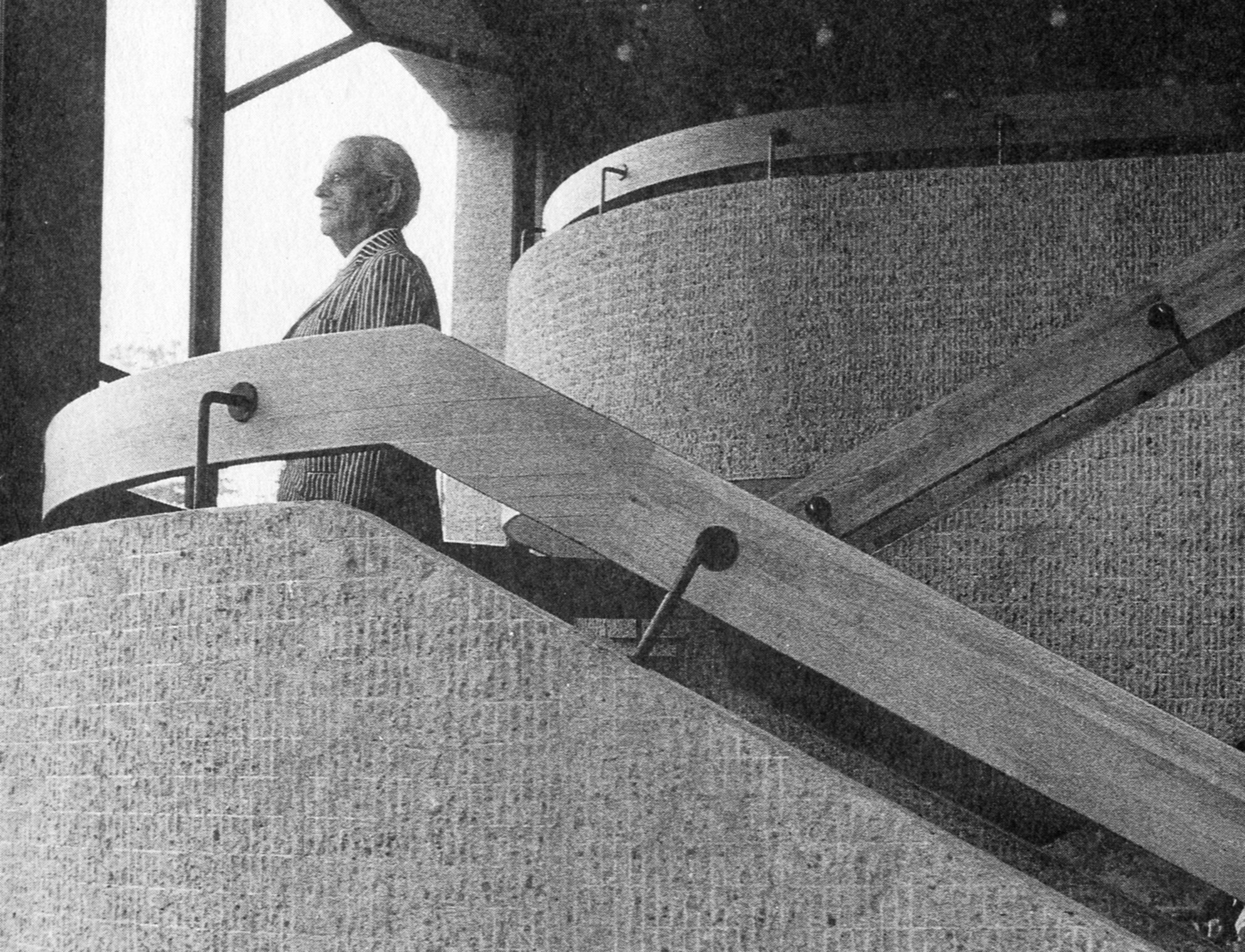 Arkitekt Sven Markelius